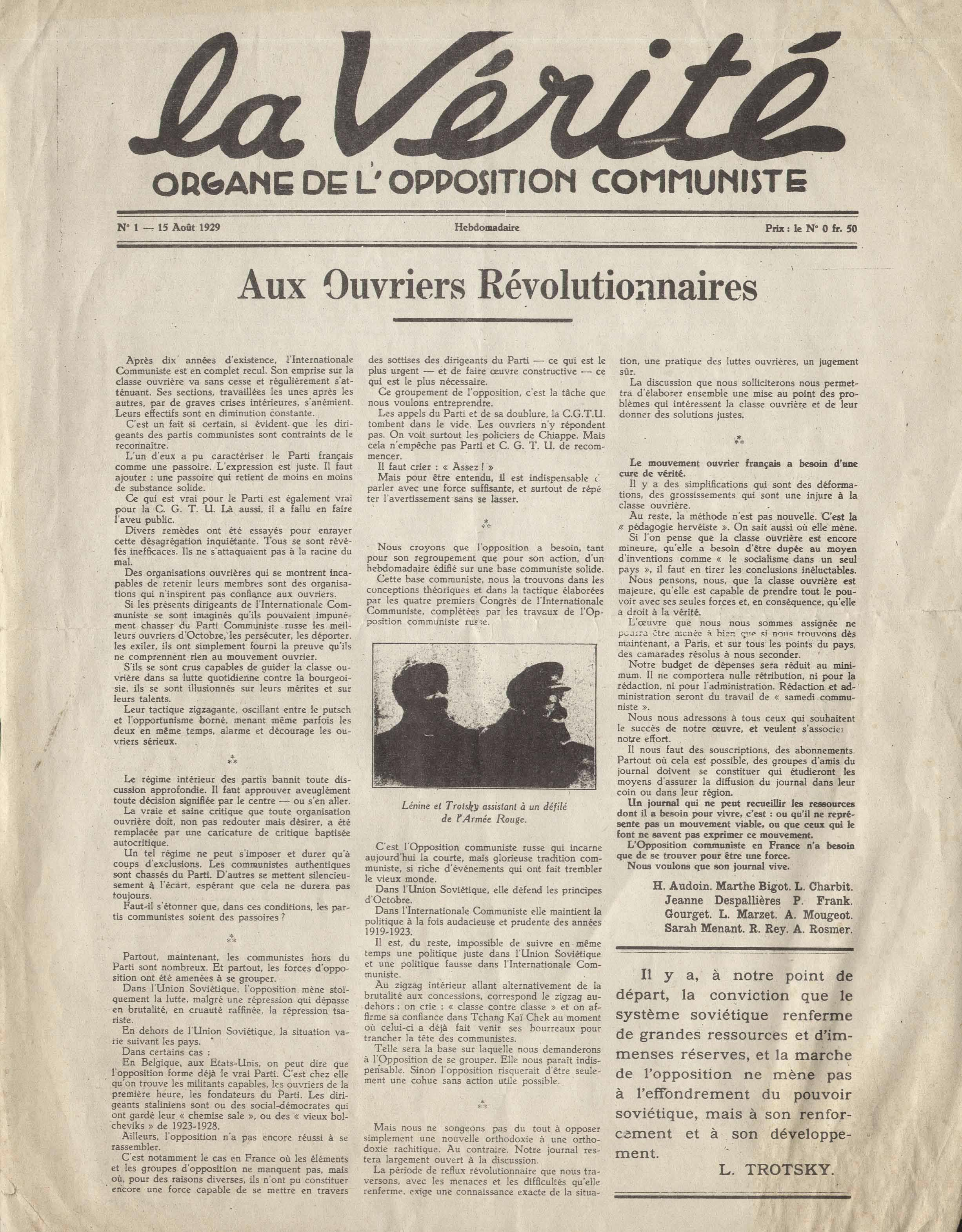 La Vérité-Numéro 1 Page 2